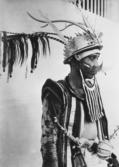 Foto. Een man van Nias in krijgskleding